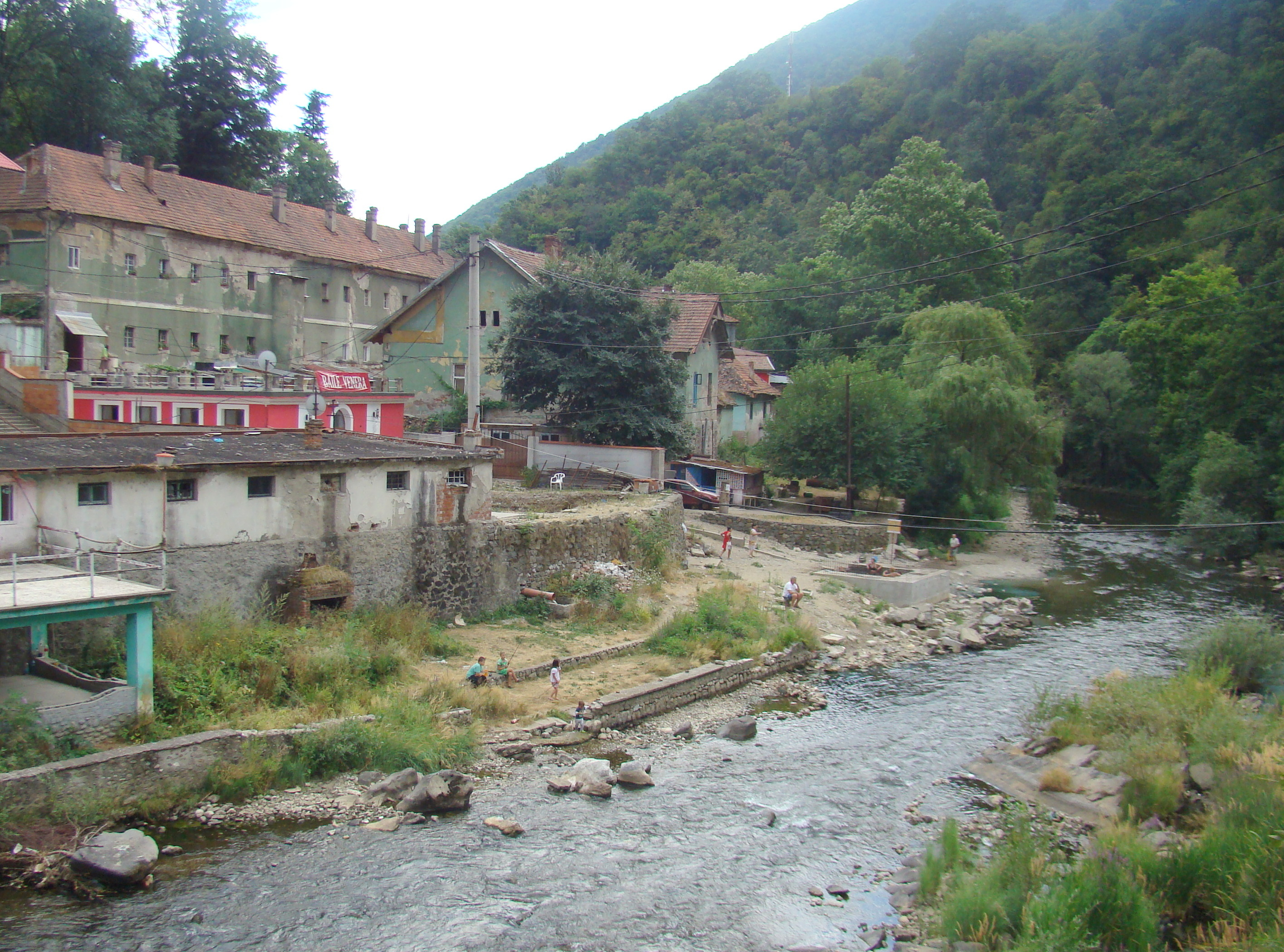 Băile „Venera”, azi locuințe, oraș Băile Herculane, Str. Castanilor 35